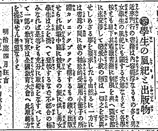 朝日新聞で初めて「カンニング」の文字が登場した記事